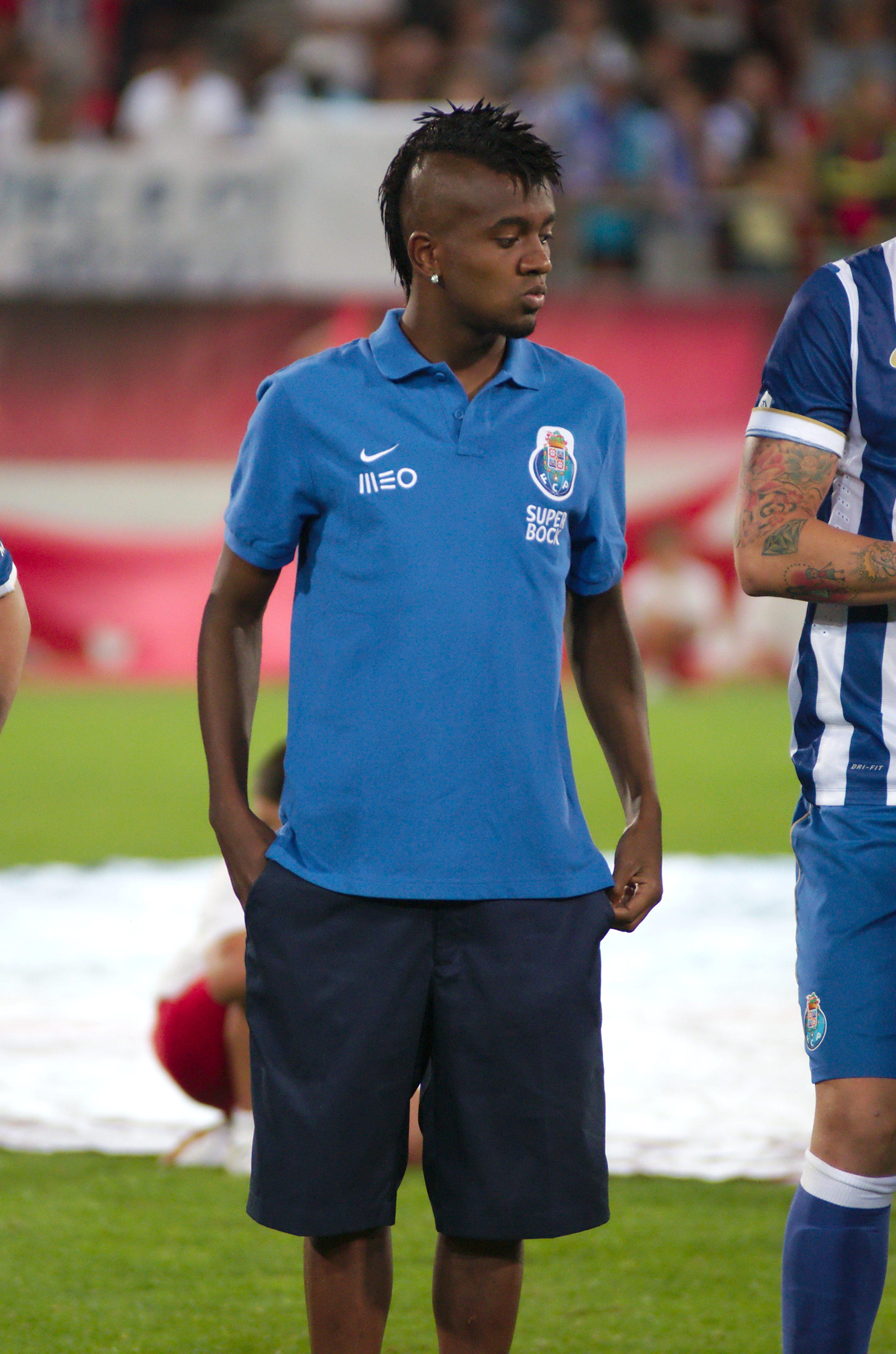 Valais Cup 2013 - OM-FC Porto - 20130713 - Kelvin